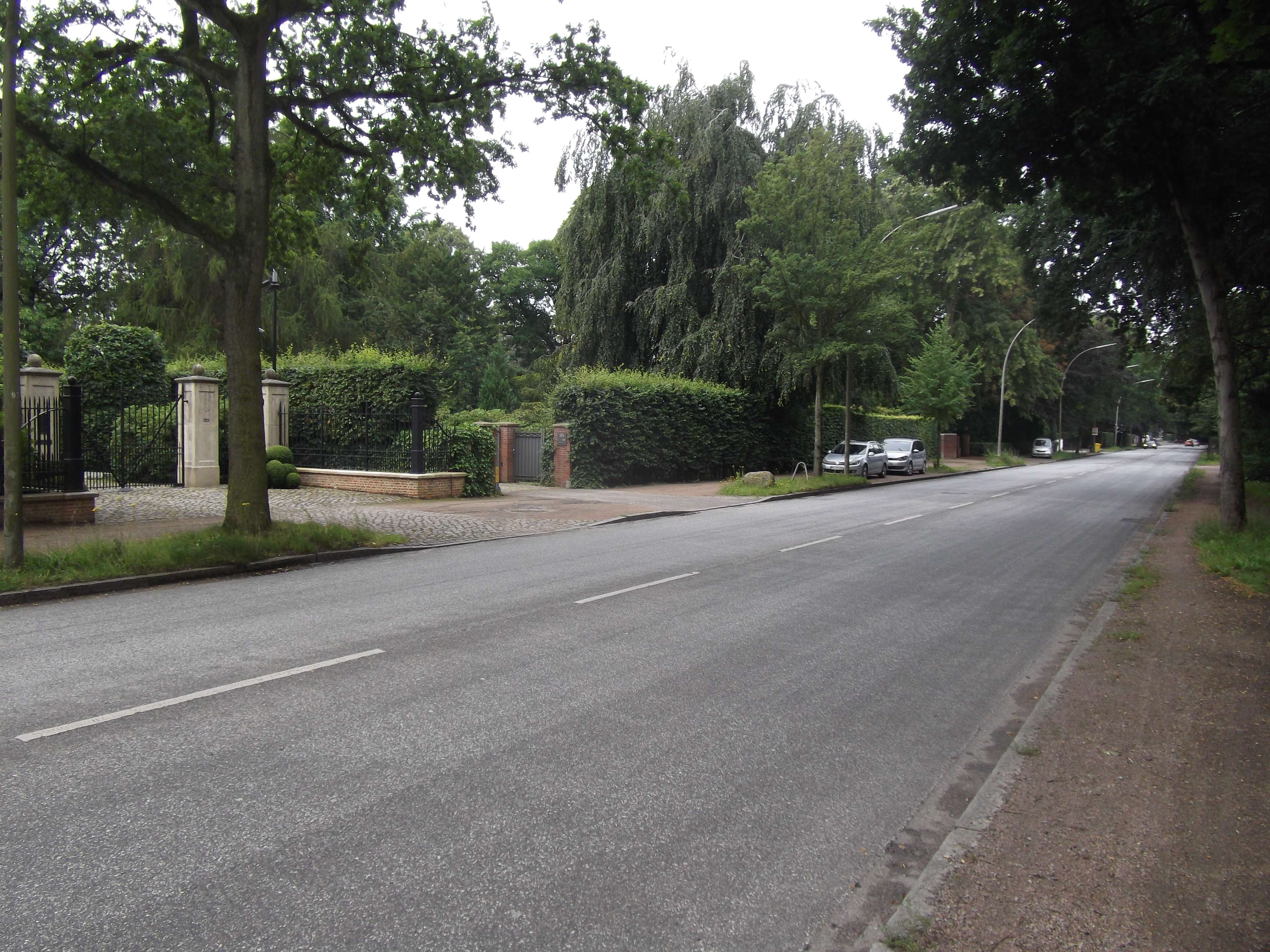 Hamburg, August 2015